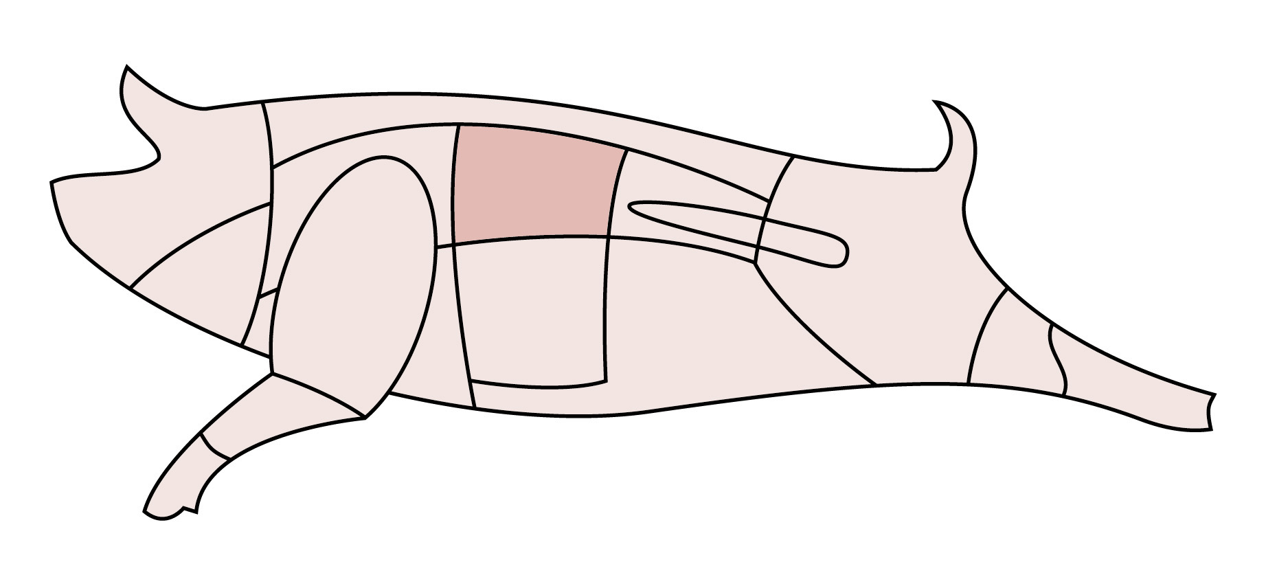 Schematische Darstellung eines Schweins, Stielkotelett. Eigene Zeichnung. GNU-FDL